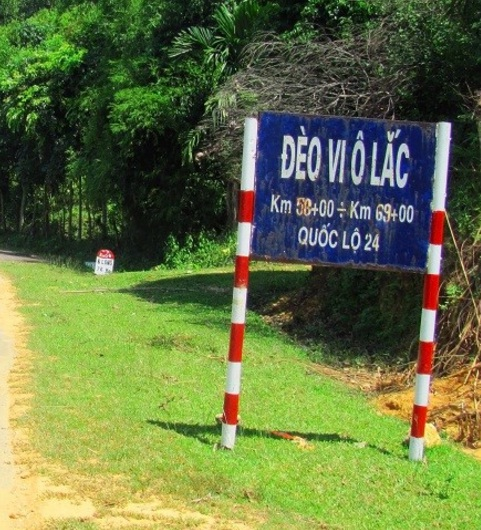 Đèo Vi Ô Lắc, Việt Nam